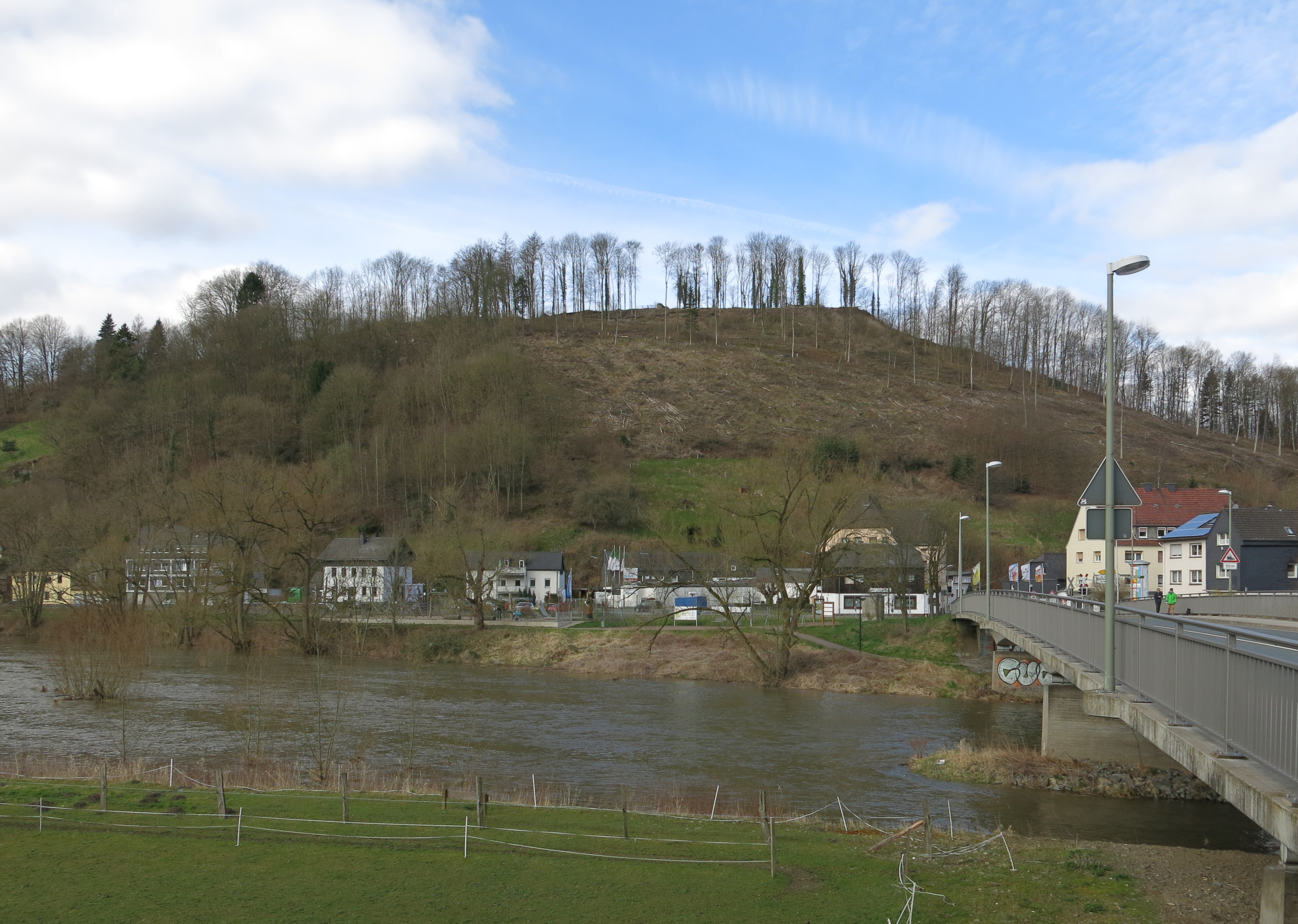 Der Standort der Rüdenburg auf einer Alte Burg, Römberg oder Rüdenberg genannten Anhöhe. Rechts die Jägerbrücke über die Ruhr.